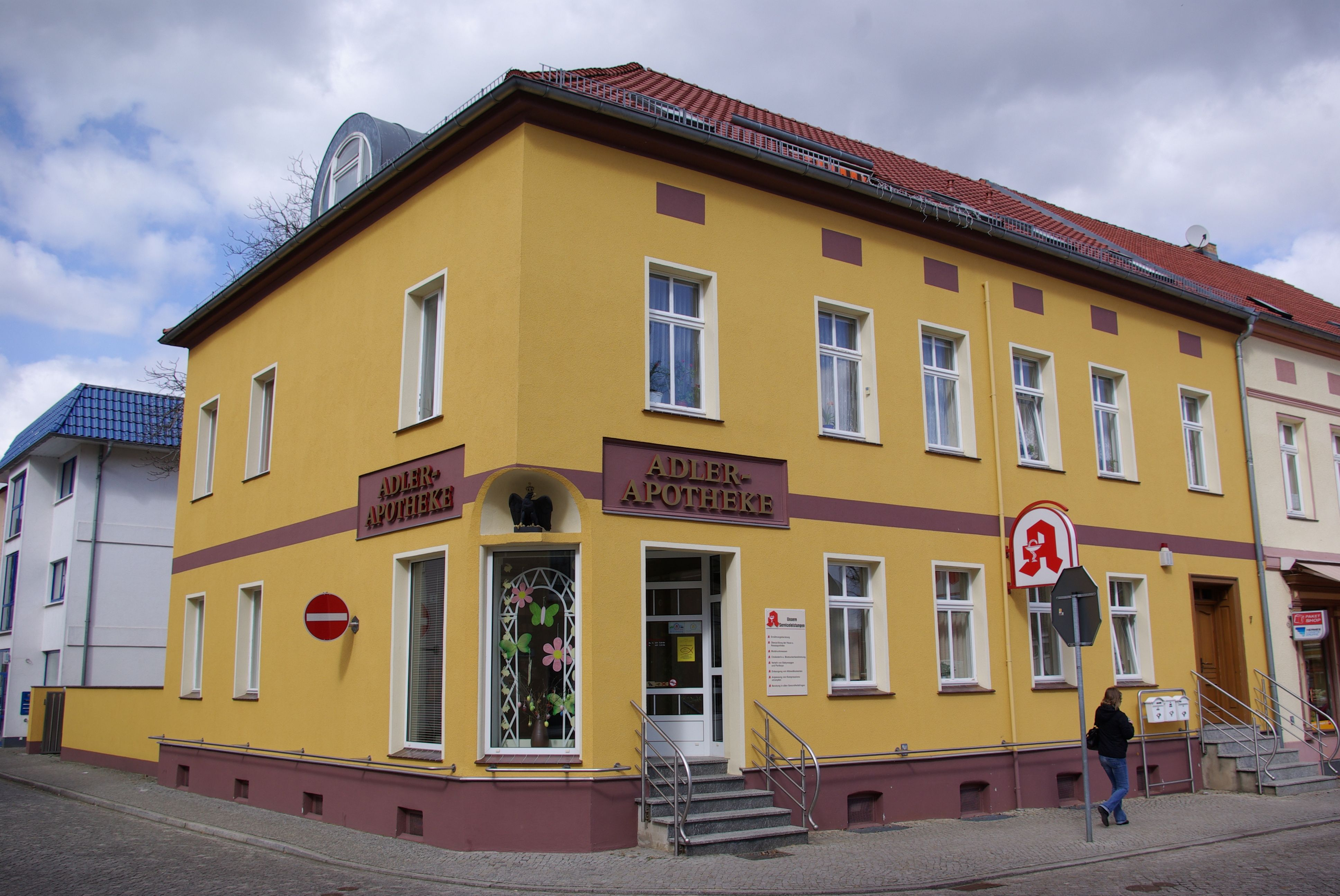 Golßen in Brandenburg. Die Adler-Apotheke steht Am Markt 7. Die Offizin der Apotheke steht unter Denkmalschutz.